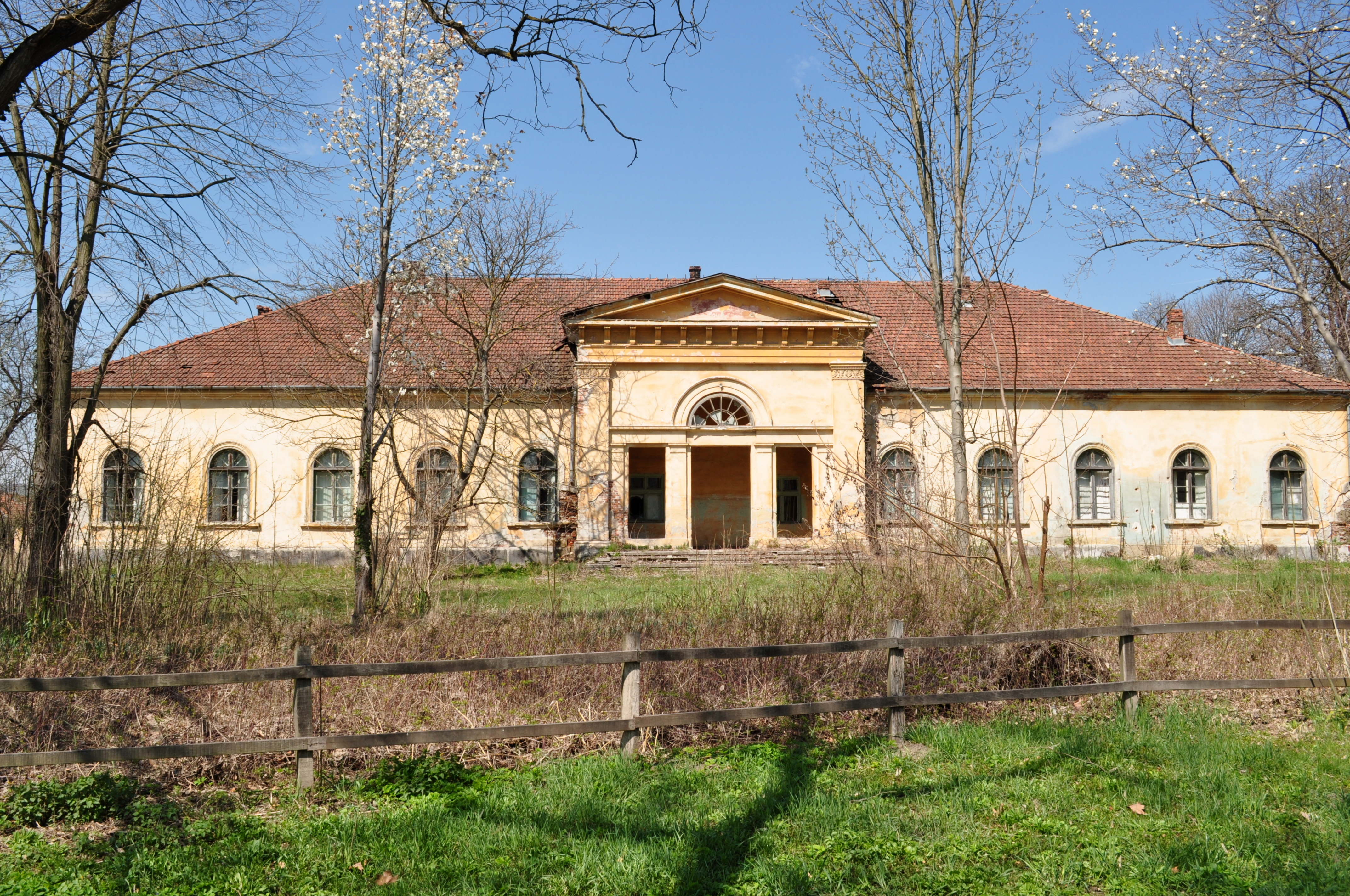 Castelul Bornemisza din ilia, județul Hunedoara